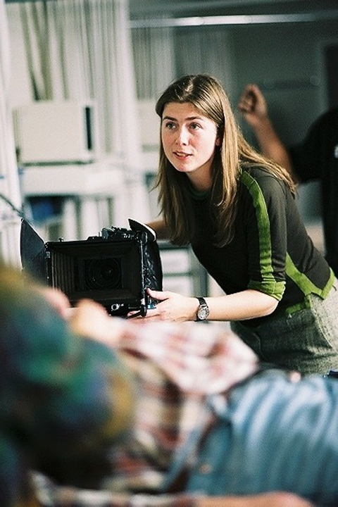 Mannin de Wildt op de set van haar korte film Opruiming